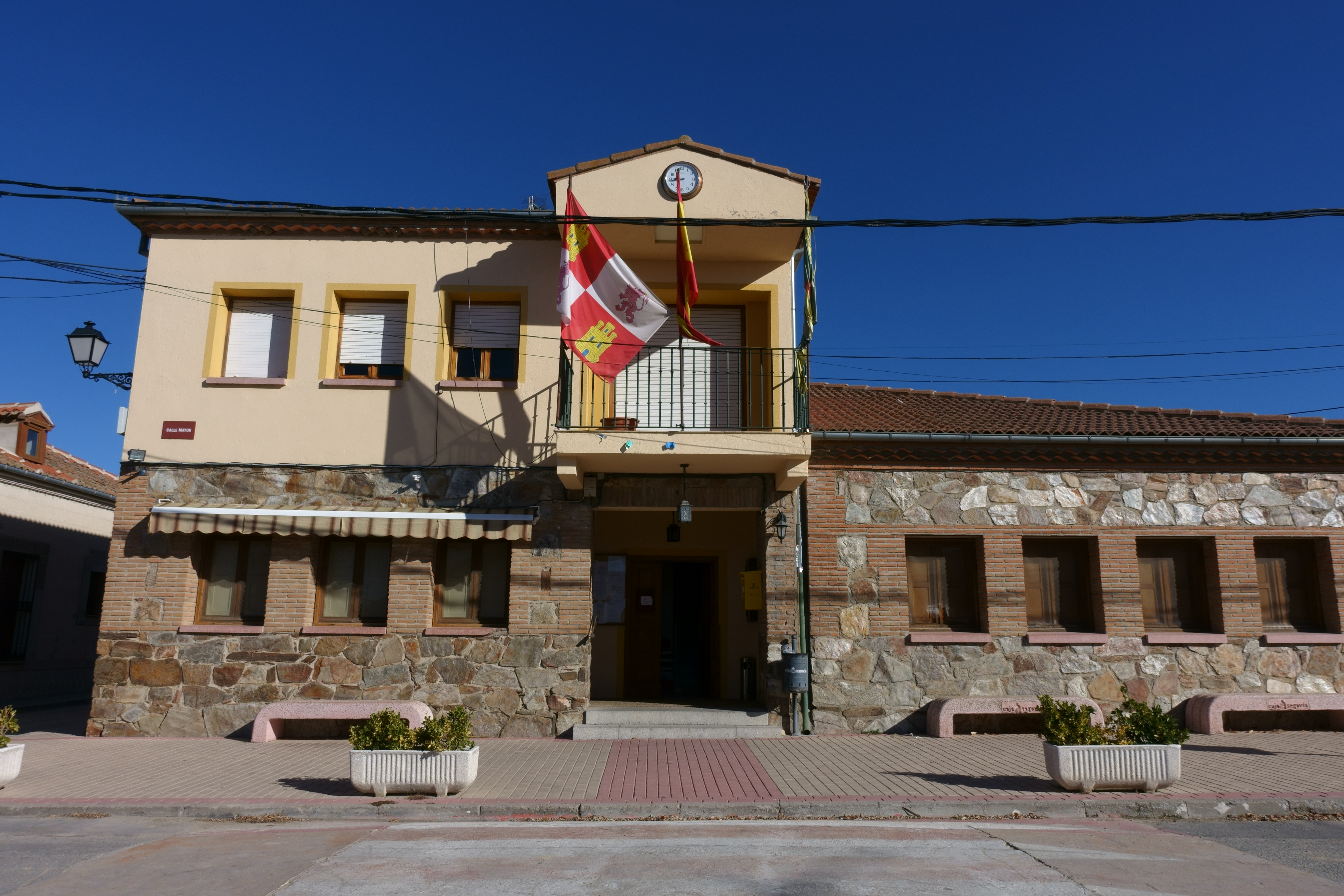 Casa consistorial de Anaya (Segovia, España).